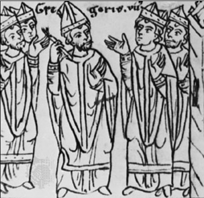 Ppaež Jiří VII. exkomunikuje císaře Jindřicha IV.